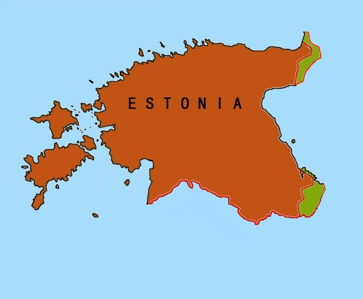 Mapa de Estonia con los territorios cedidos a Rusia tras la independencia. Es el mapa usado en el diseño de las monedas de euro de Estonia.